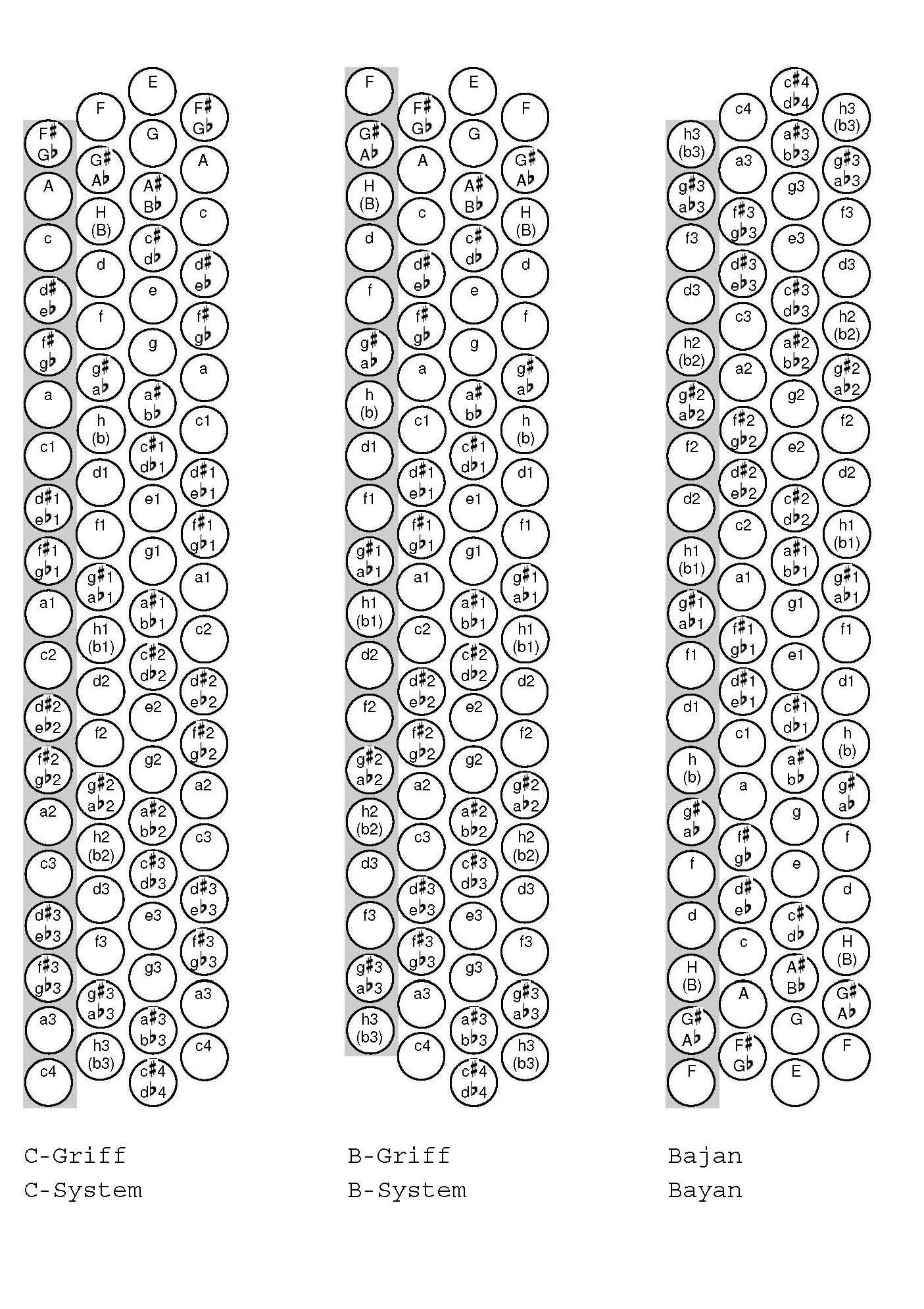 Melodiebasssysteme C-Griff, B-Griff, Bajan